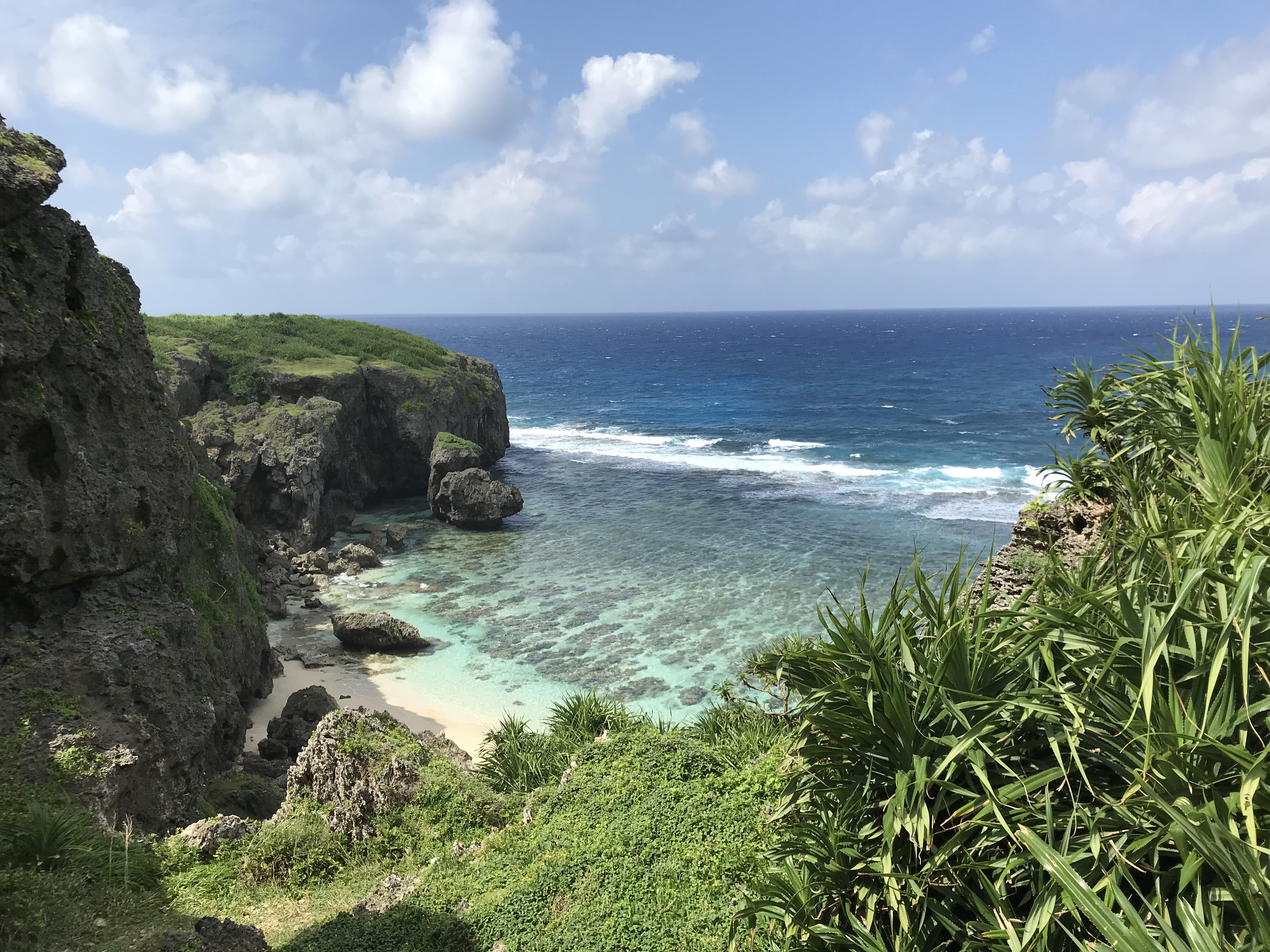 沖縄県与那国島六畳ビーチ